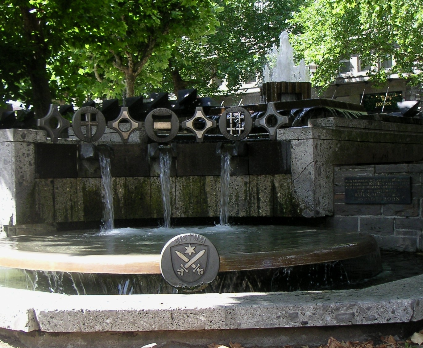 Brunnen beim Essener Münster. Aus drei Schalen, markiert mit den Wappen der Bistümer Münster, Paderborn und Köln, fließt das Wasser in die mit dem Wappen des Bistums Essen bezeichnete Schale